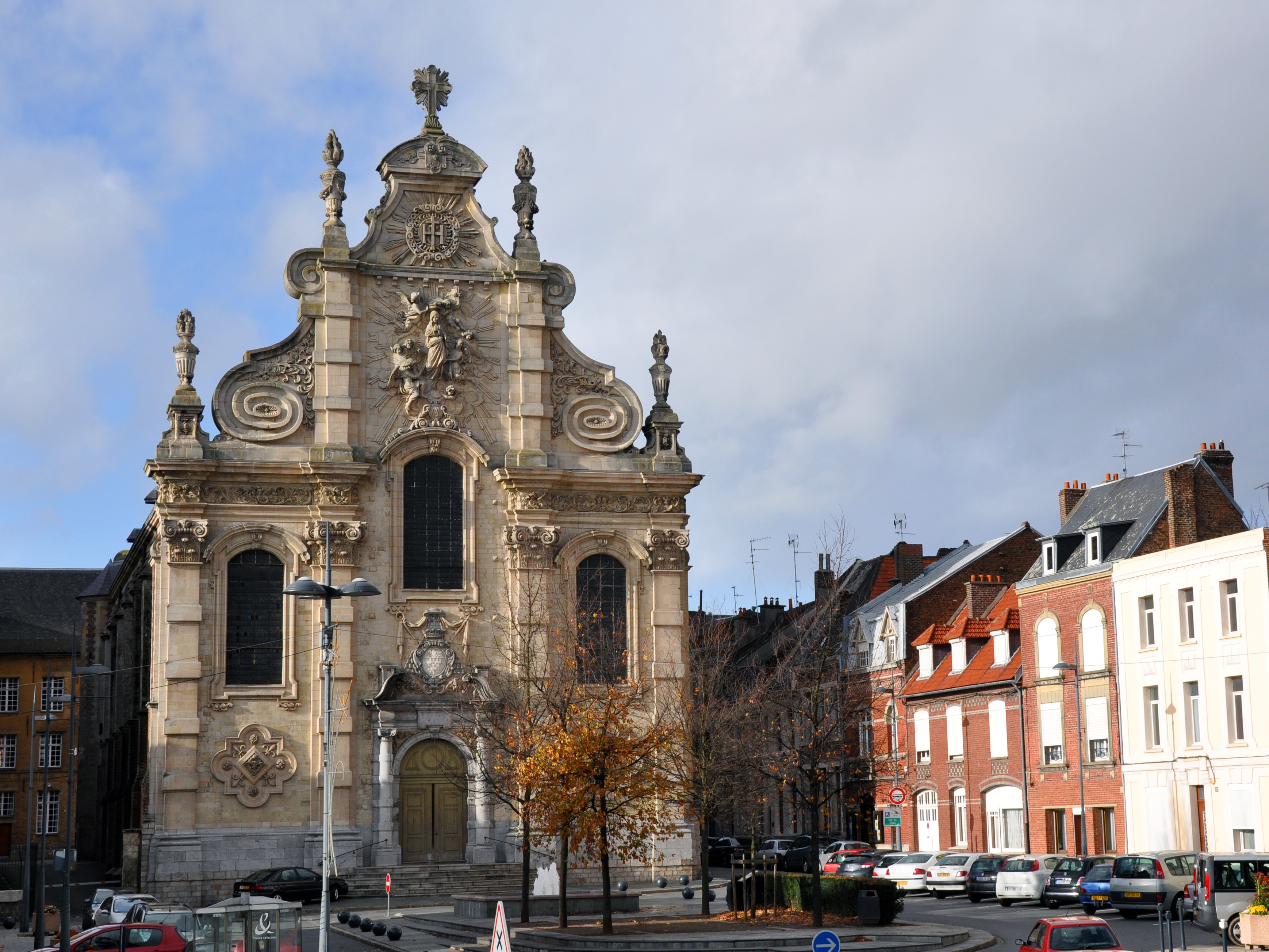 La Chapelle des Jésuites (1692) à Cambrai.